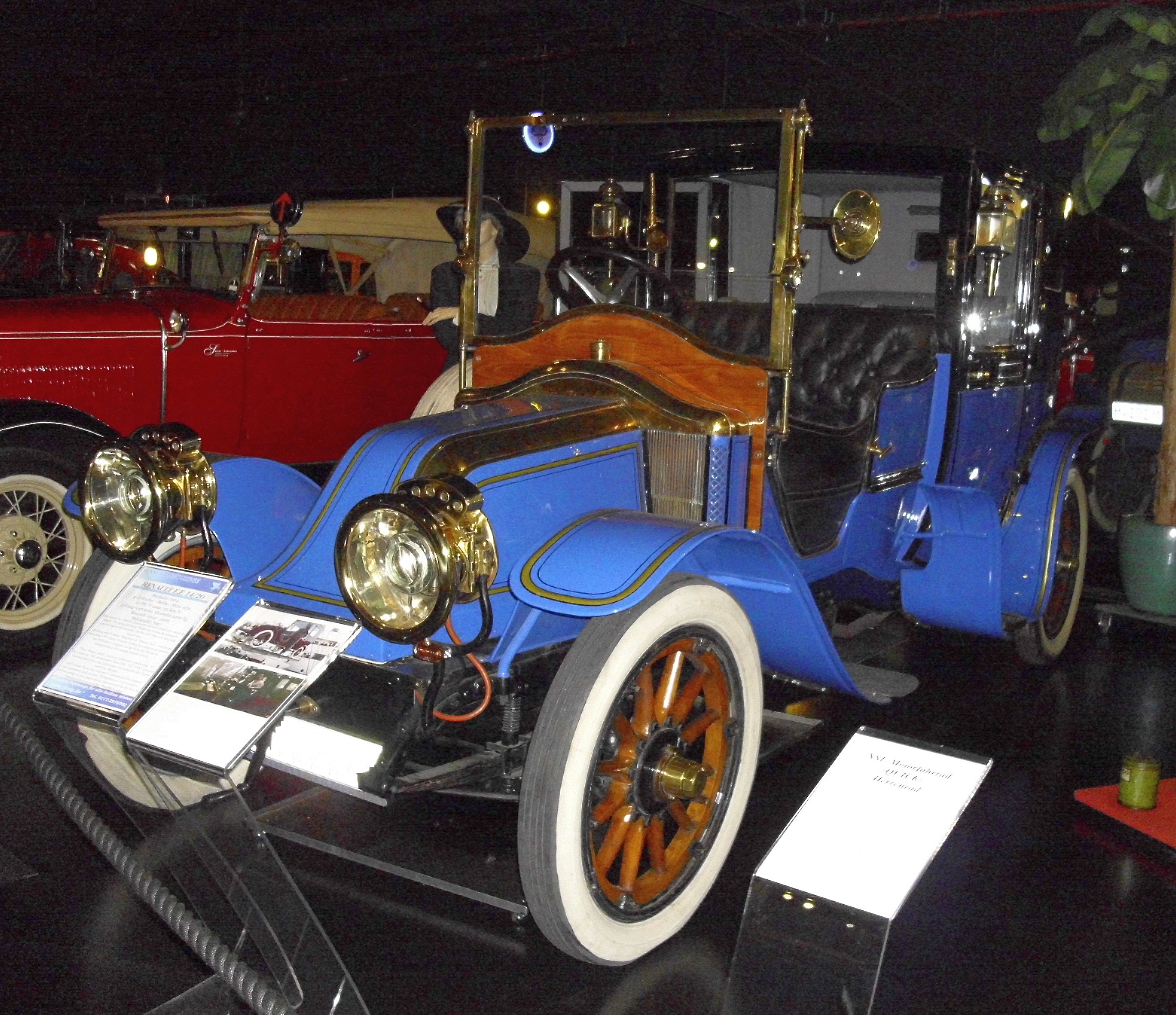 Renault Type EF Coupé-Chauffeur 1914